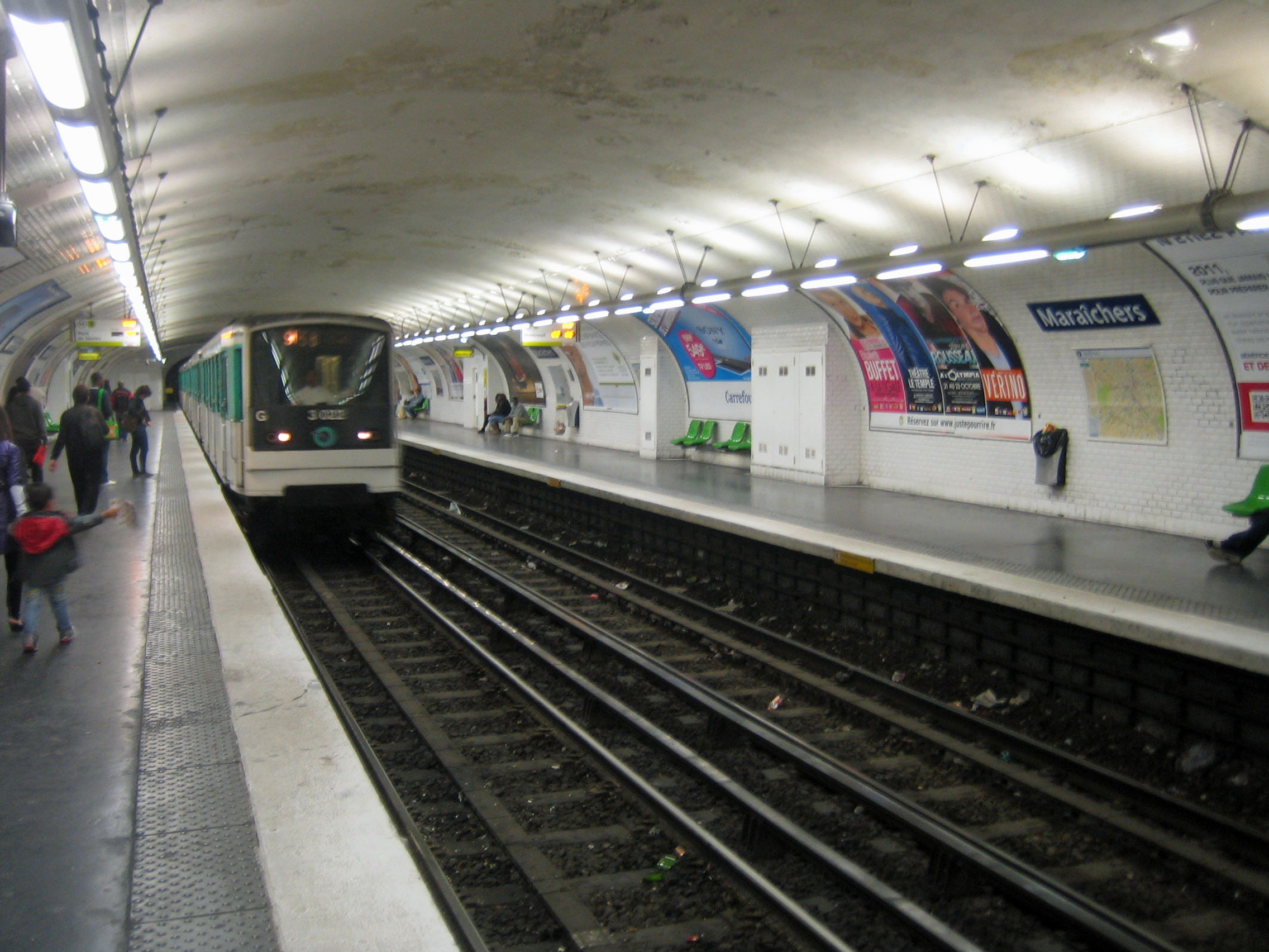 Station de métro Maraîchers - Ligne 9